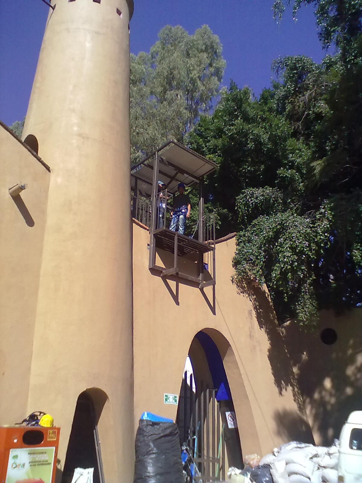 Entrada al Parque Ecológico Chapultepec